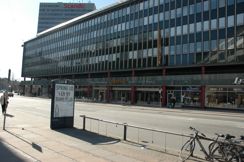 Imperial Biograf, Copenhagen